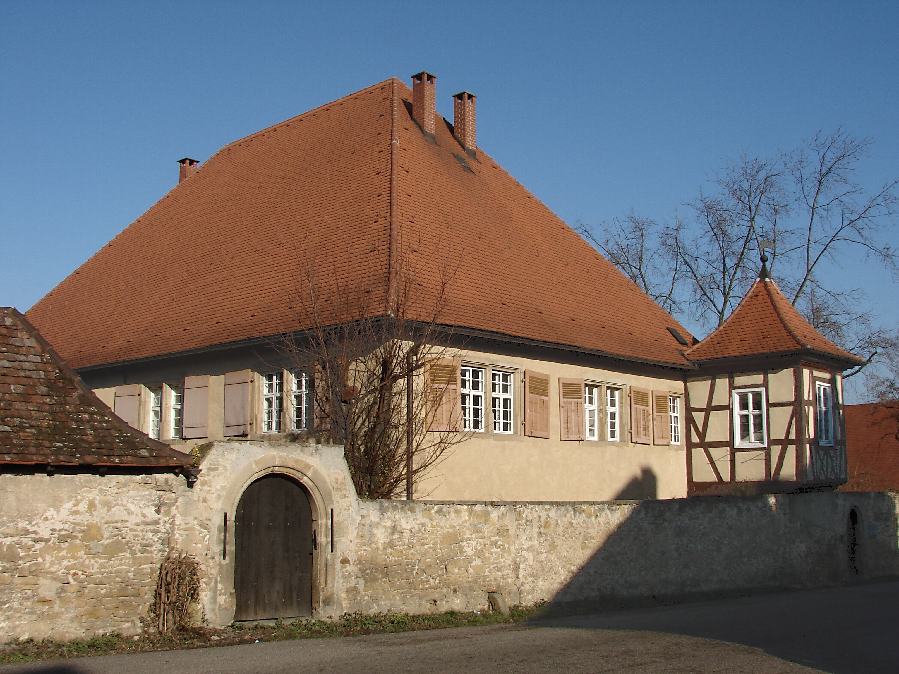 Freiberg am Neckar, castle of Heutingsheim